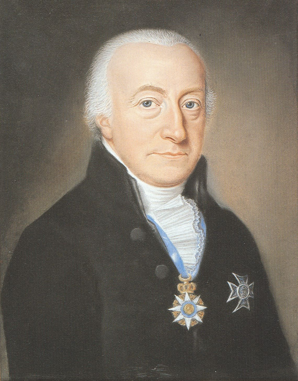 Mr. Egbert Lewe van Middelstum (1743 - 1822) als Commandeur van de Orde van Verdiensten in 1807. Pasteltekening